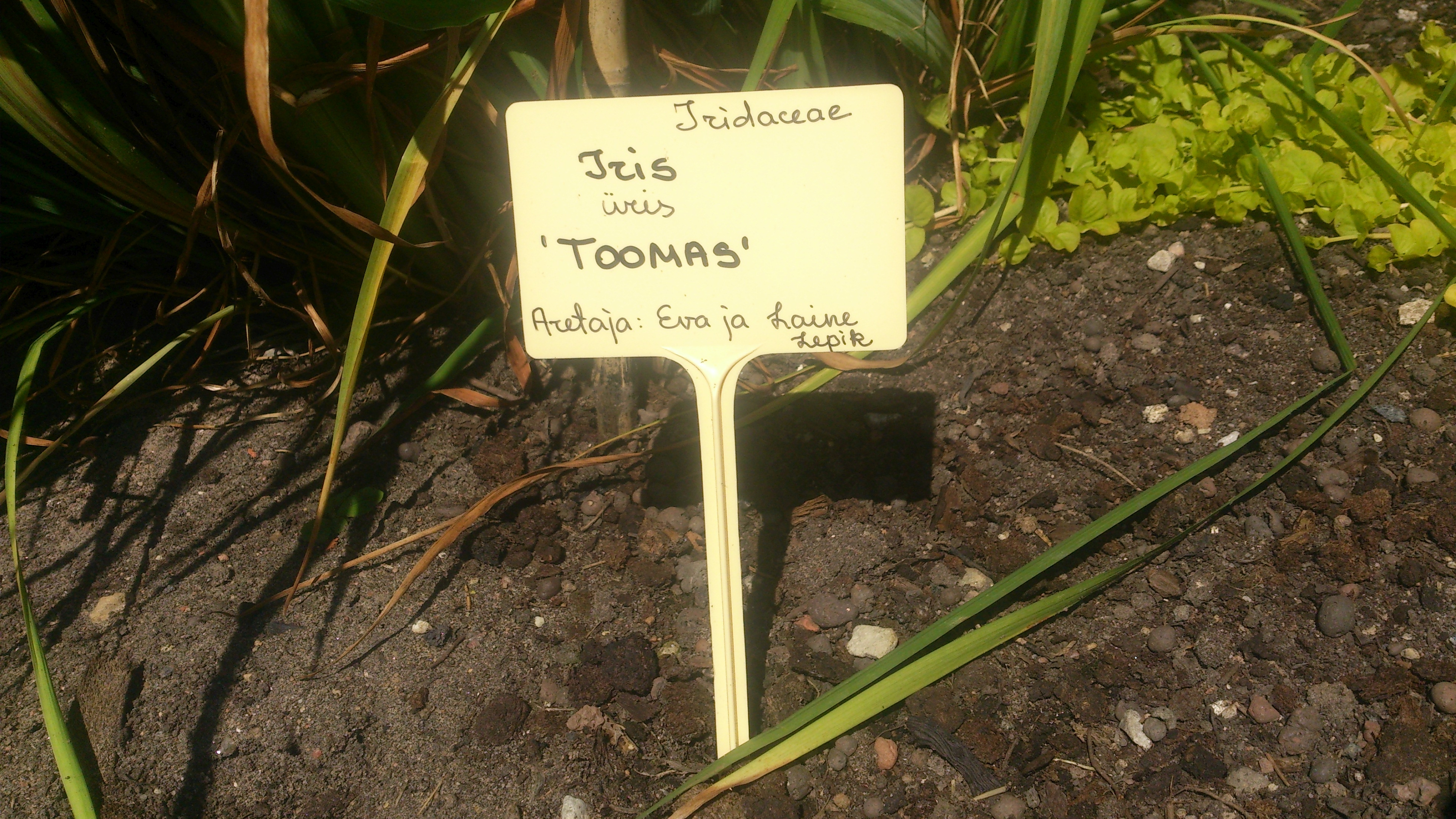 Iiris 'Toomas', aretajad Eva ja Laine Lepik, Tartu botaanikaaias 21. juulil 2015